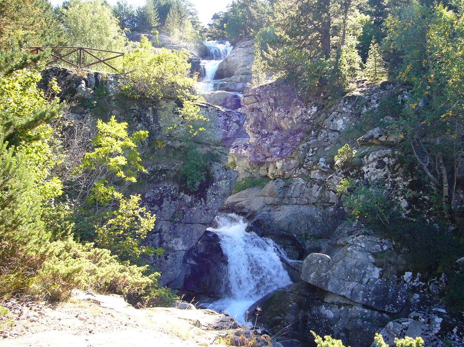 Cascada de Sant Esperit; la Vall de Boí, Alta Ribagorça, Catalunya